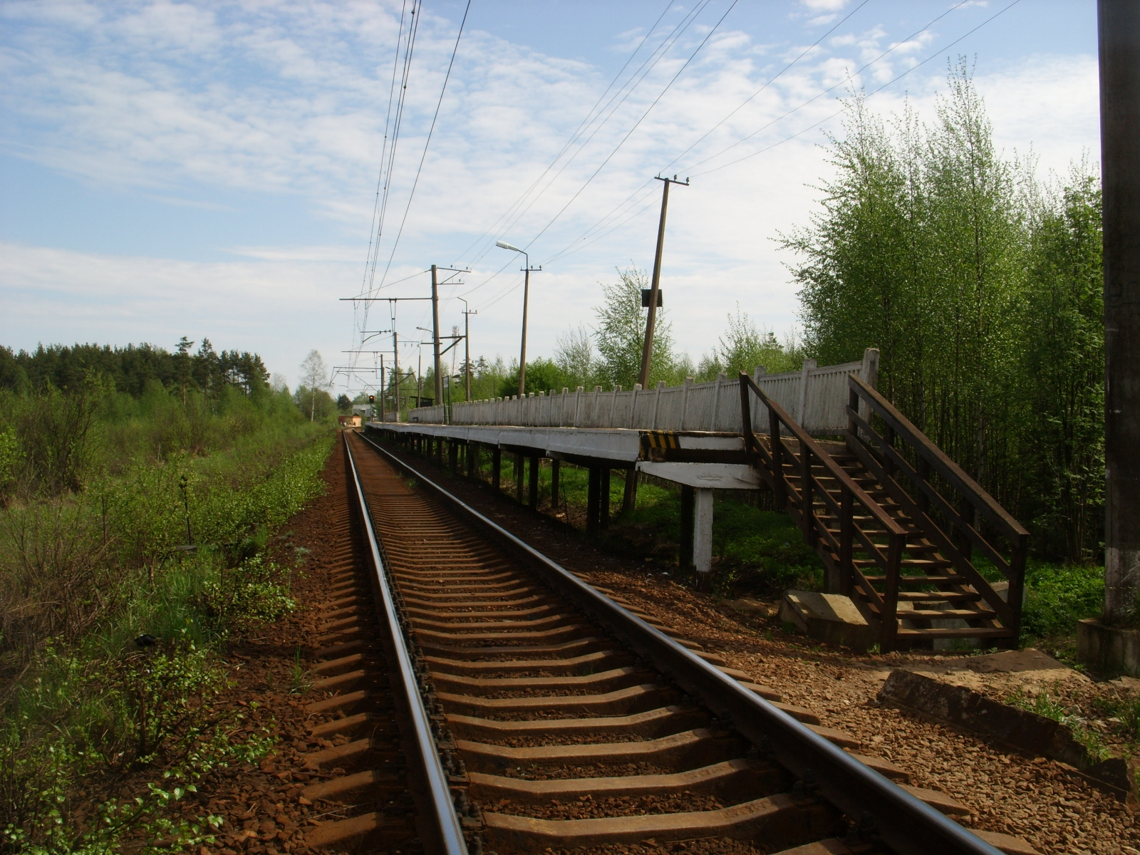 Пл. Проба, Ленинградская область. Вид в сторону Ладожского Озера